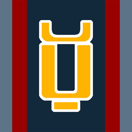 Simbolo de Aerilon